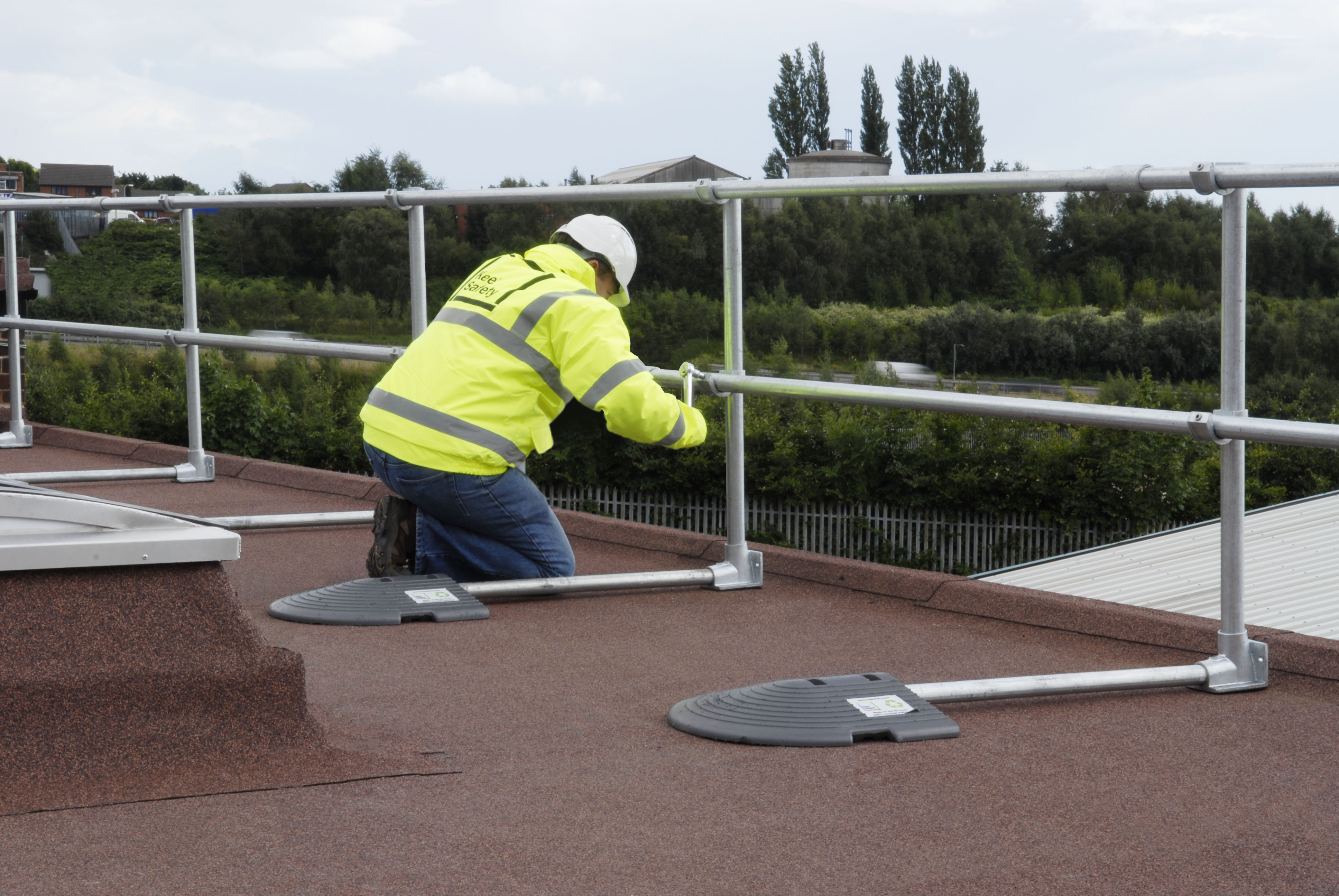 Garde-corps autoportant KeeGuard pour toiture terrasse non accessible au publique de KeeSafety SAS 30 boulevard Pasteur 75015 Paris.